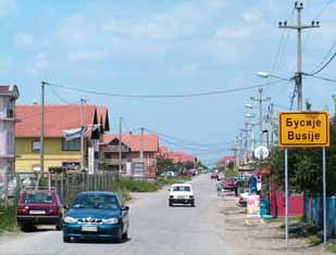 Busije